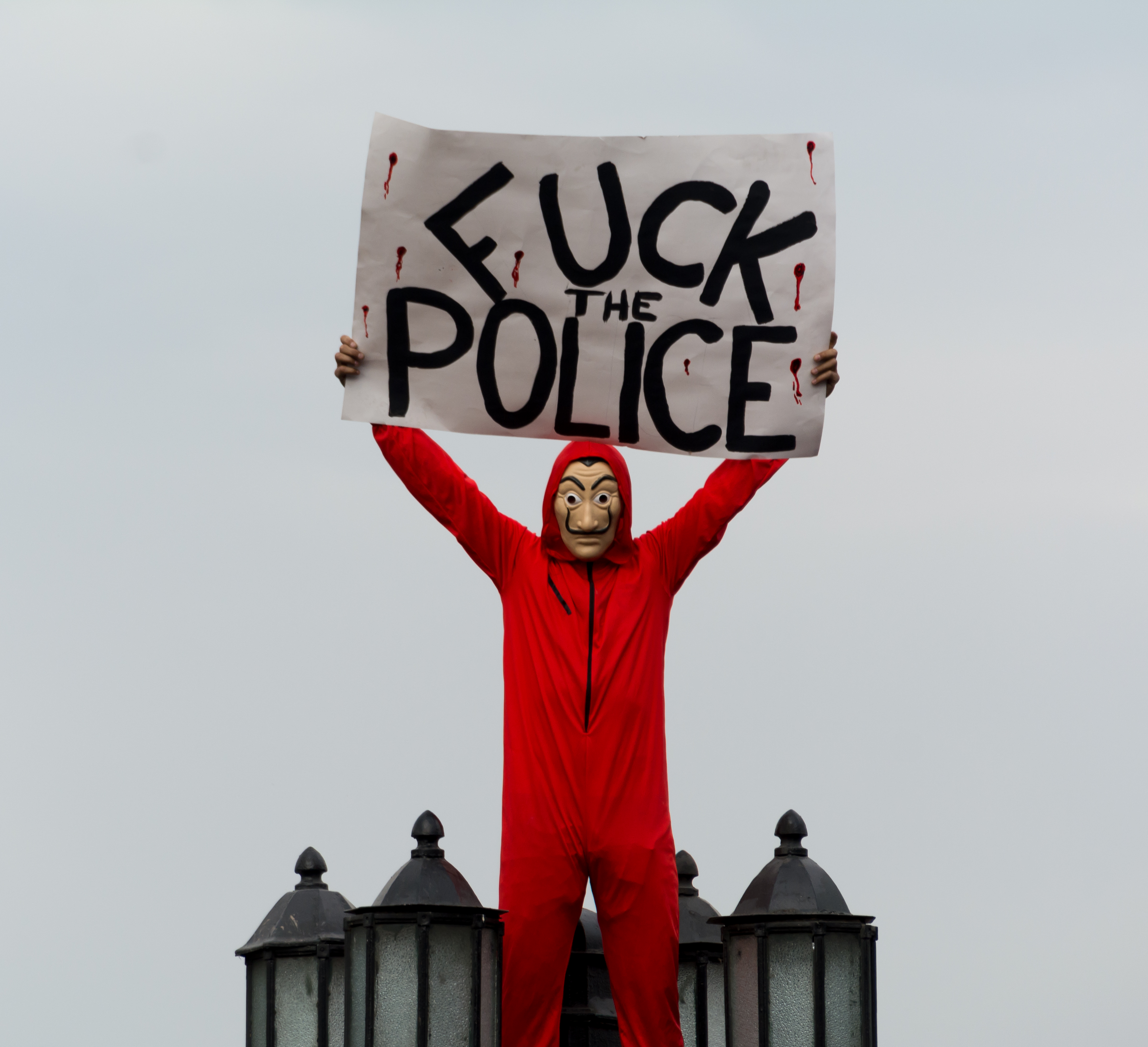 Protestas en Chile de 2019, Santiago, Chile.